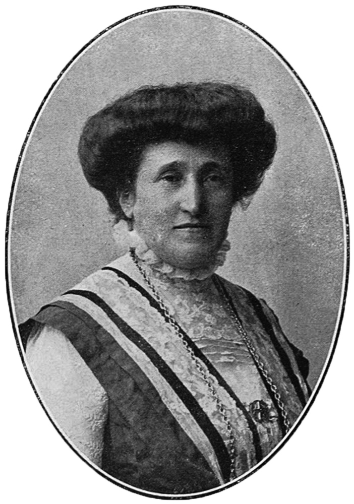 Portreto de Klara Zamenhof, ĉ. 1909